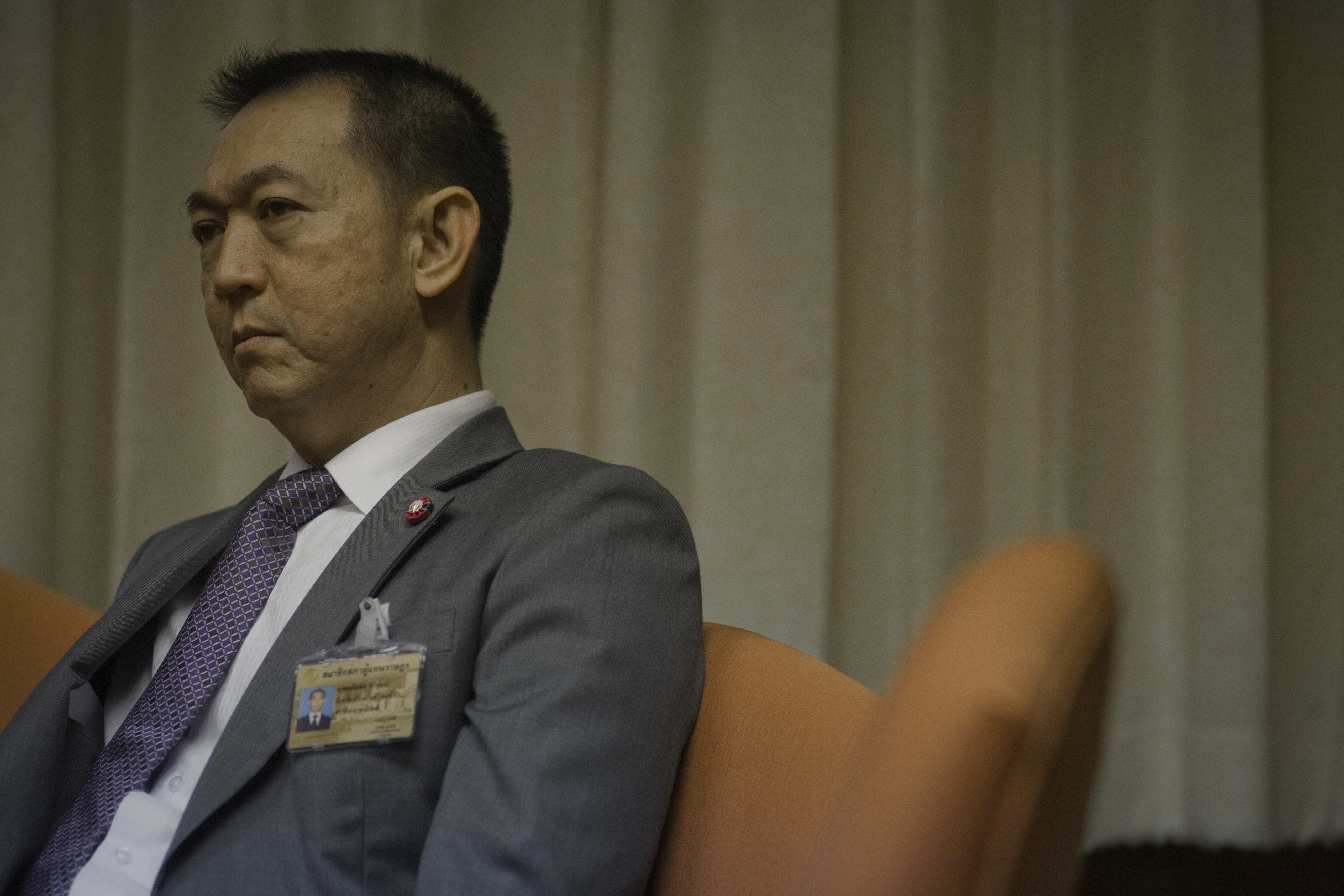 นายกรัฐมนตรีเรียกประชุมรัฐมนตรีและหน่วยงานที่เกี่ยวข้องกับสถานการณ์ ภัยพิบัติที่กำลังเกิดขึ้นในประเทศญี่ปุ่น และผลกระทบที่กำลังจะเกิดขึ้นกับประเทศไทย ณ ห้องกรรมาธิการ 4 อาคารรัฐสภา 1 วันพุธ ที่ 16 มีนาคม พ.ศ.2554 (Photographer attached to the Prime Minister of the Kingdom of Thailand (H.E.Mr.Abhisit Vejjajiva) : Peerapat Wimolrungkarat / พีรพัฒน์ วิมลรังครัตน์) @is50mm